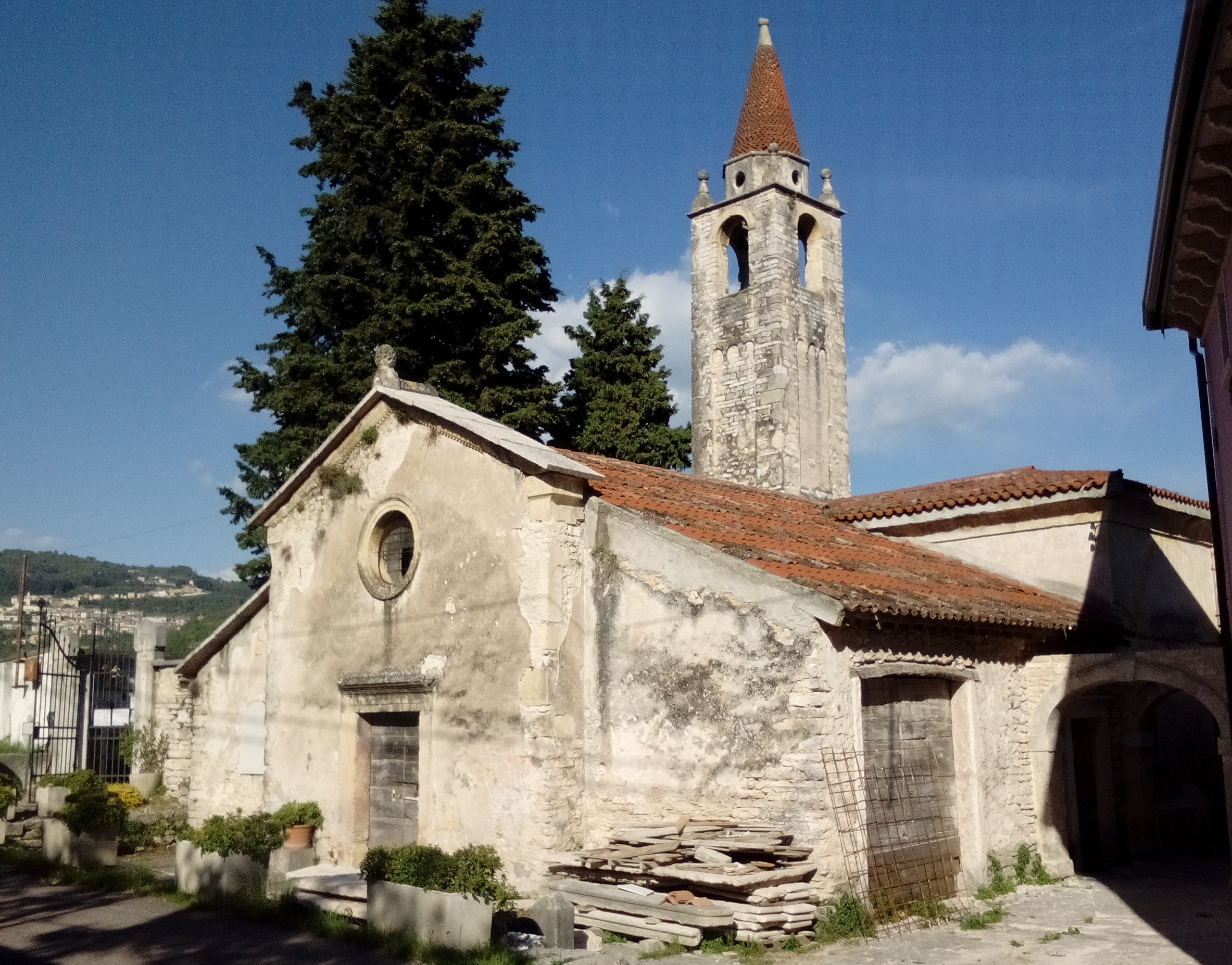 Vecchia chiesa di Torbe (il corpo centrale risale al XII secolo) ormai sconsacrata e abbandonata. Inzialmente era chiamata chiesa di San Pietro